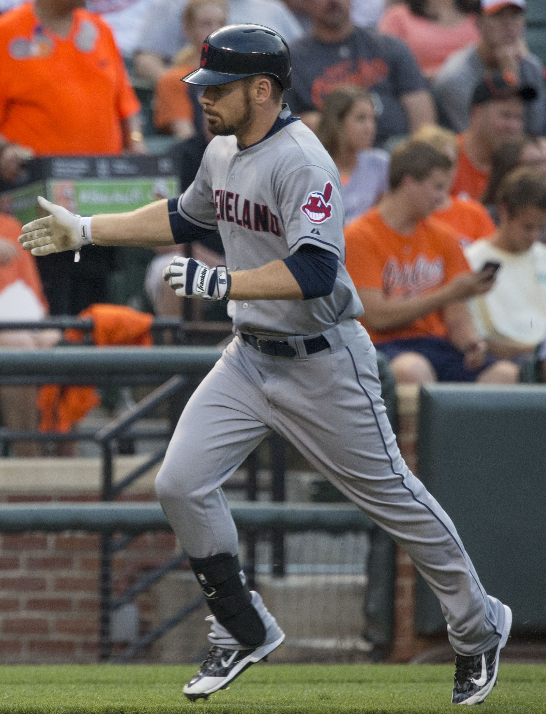 Brandon Moss